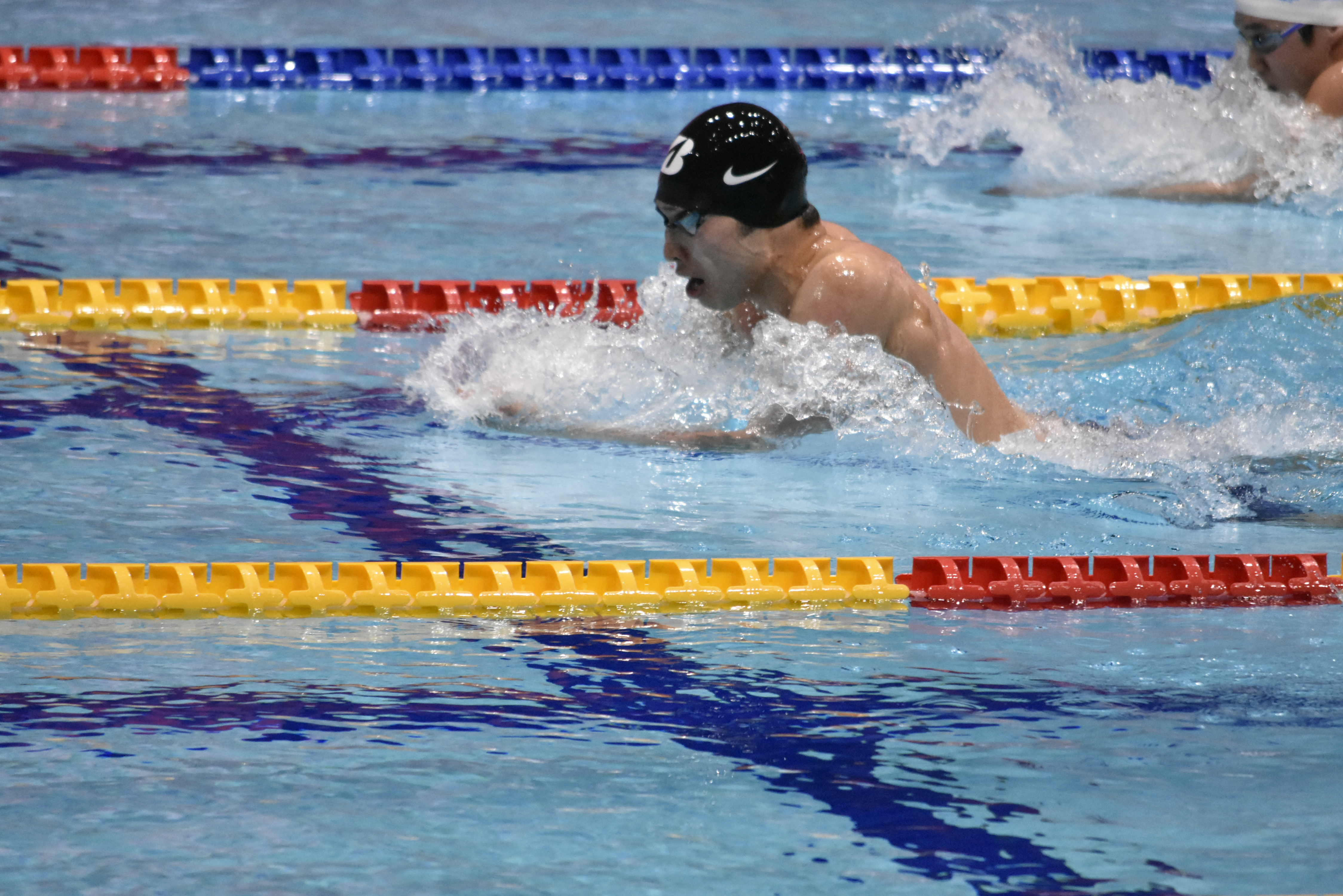 萩野 公介